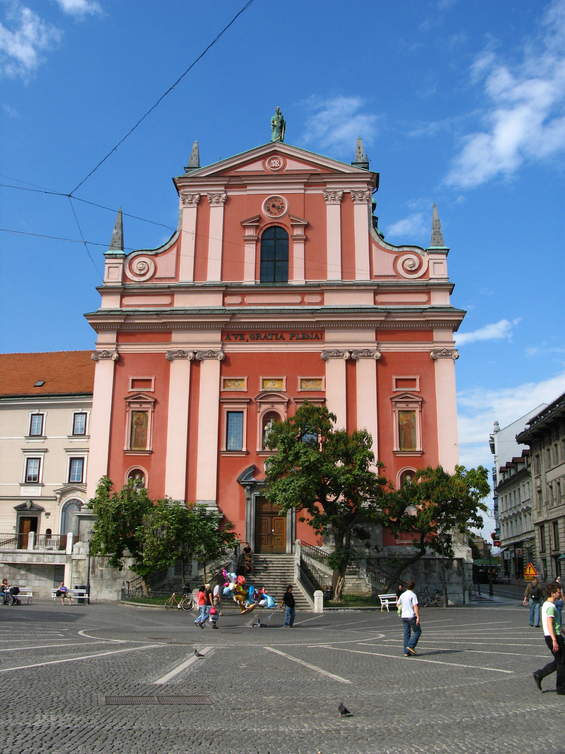 Franjevačka crkva u Ljubljani - pročelje.